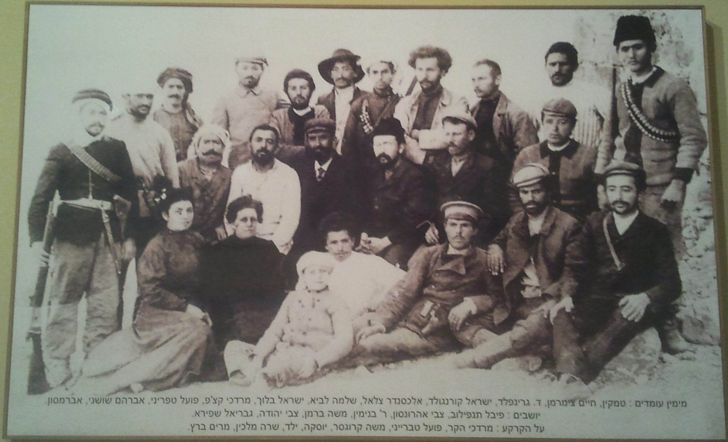 מוזיאון לתולדות כנרת נפתח בשנת 2006 במבנה במבנה בשנת 1929 תצוגה בחדר מס' 2 בחוות כנרת